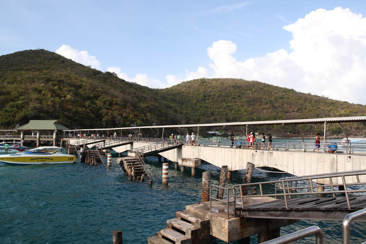 Koh Lan Pier